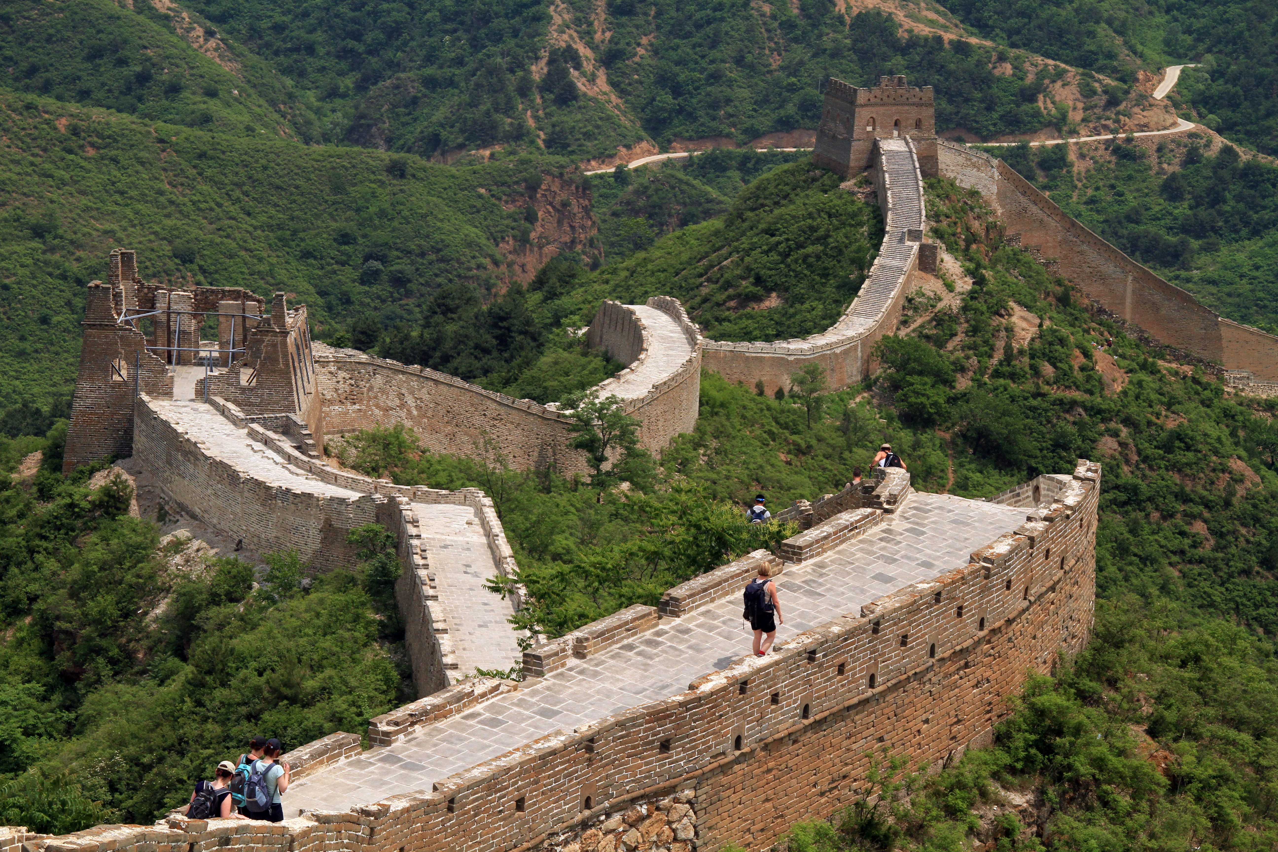 Jingshaling to Simatai 61